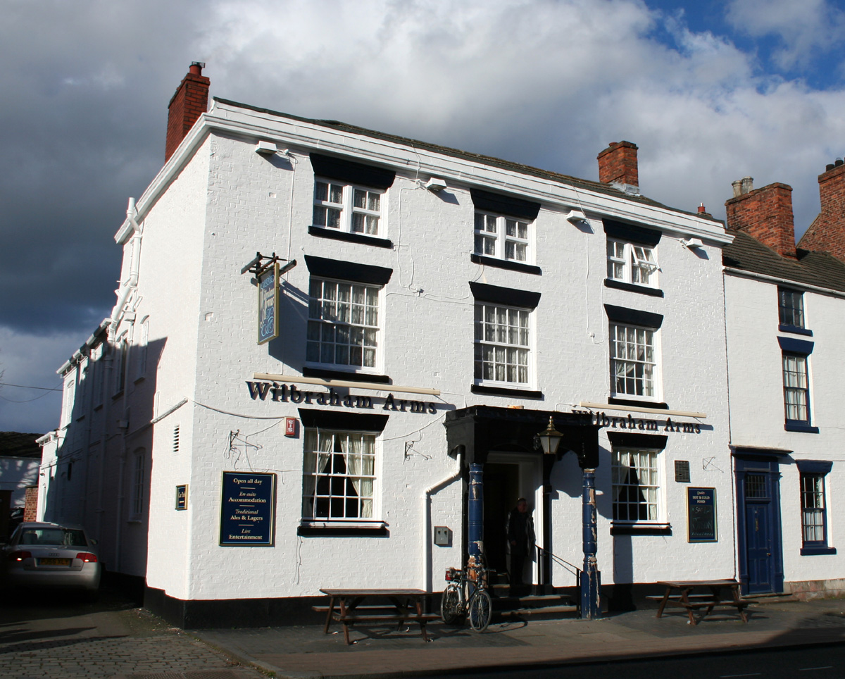 Wilbraham Arms, Welsh Row, Nantwich